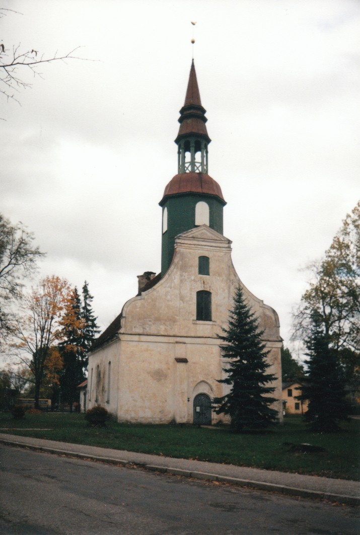 Lugažu Sv.Katrīnas luterāņu baznīca